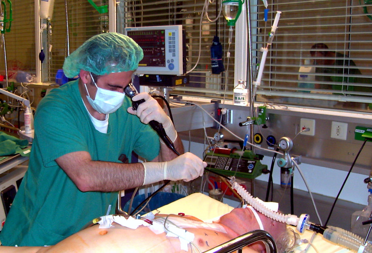 Bronxoskopiya:Ağciyərlərin bronx və alveolalarının lavaşı.